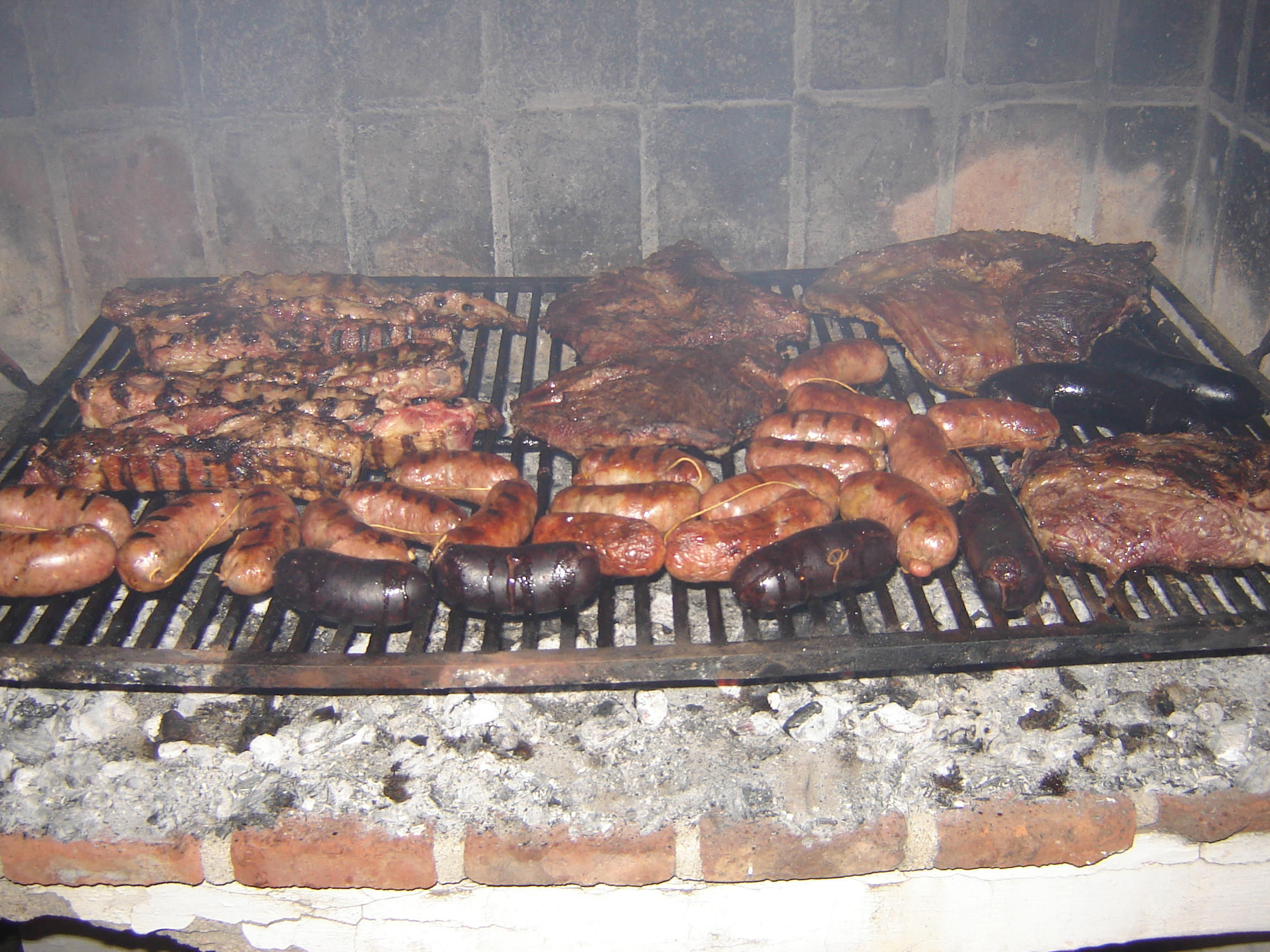 Asado argentino a las brasas - costillas o tiras de asado, chorizos criollos argentinos, morcilla, vacío, tapa de asado